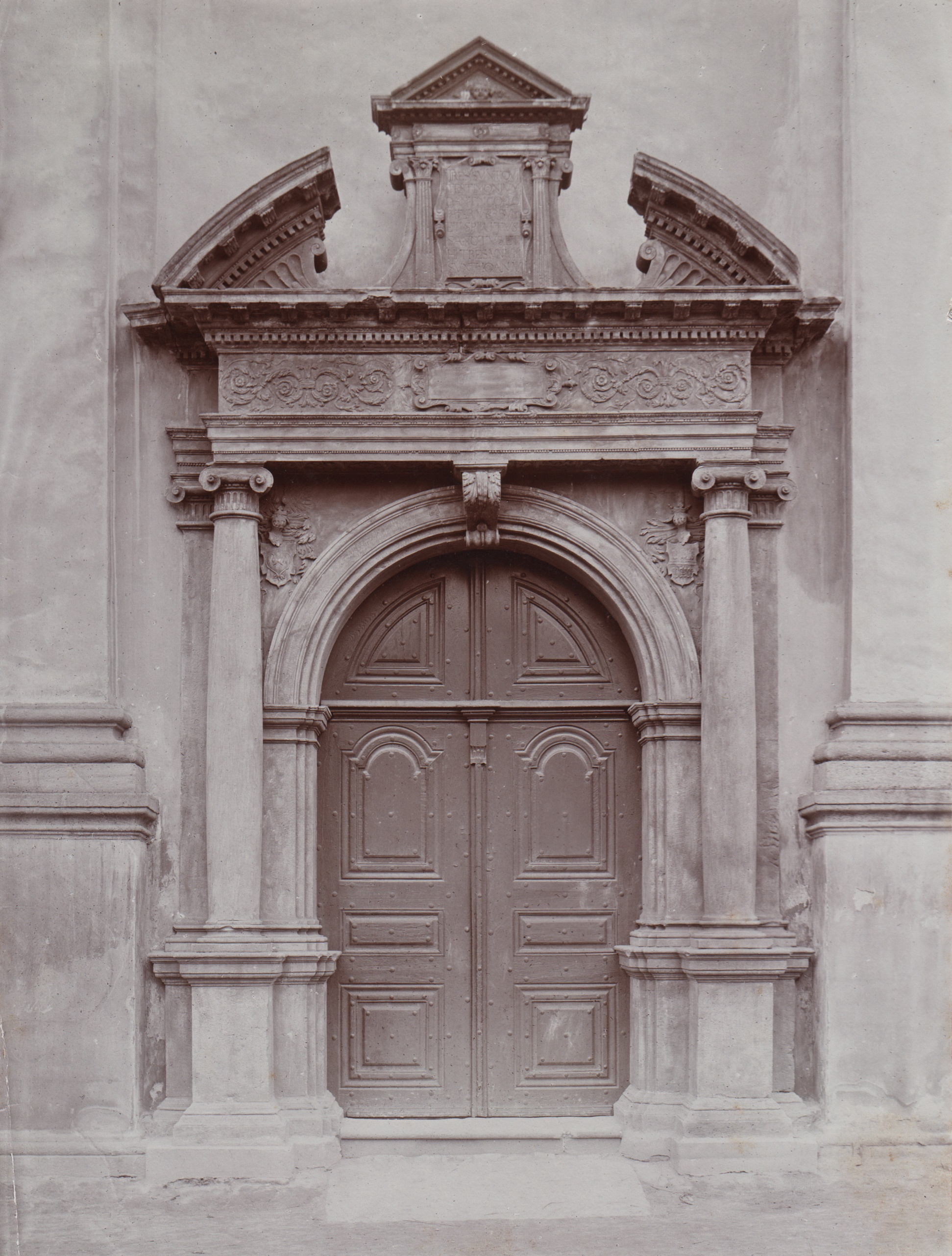 Kostel Nejsvětější Trojice, Smečno (okres Rakovník), západní průčelí, detail portálu.